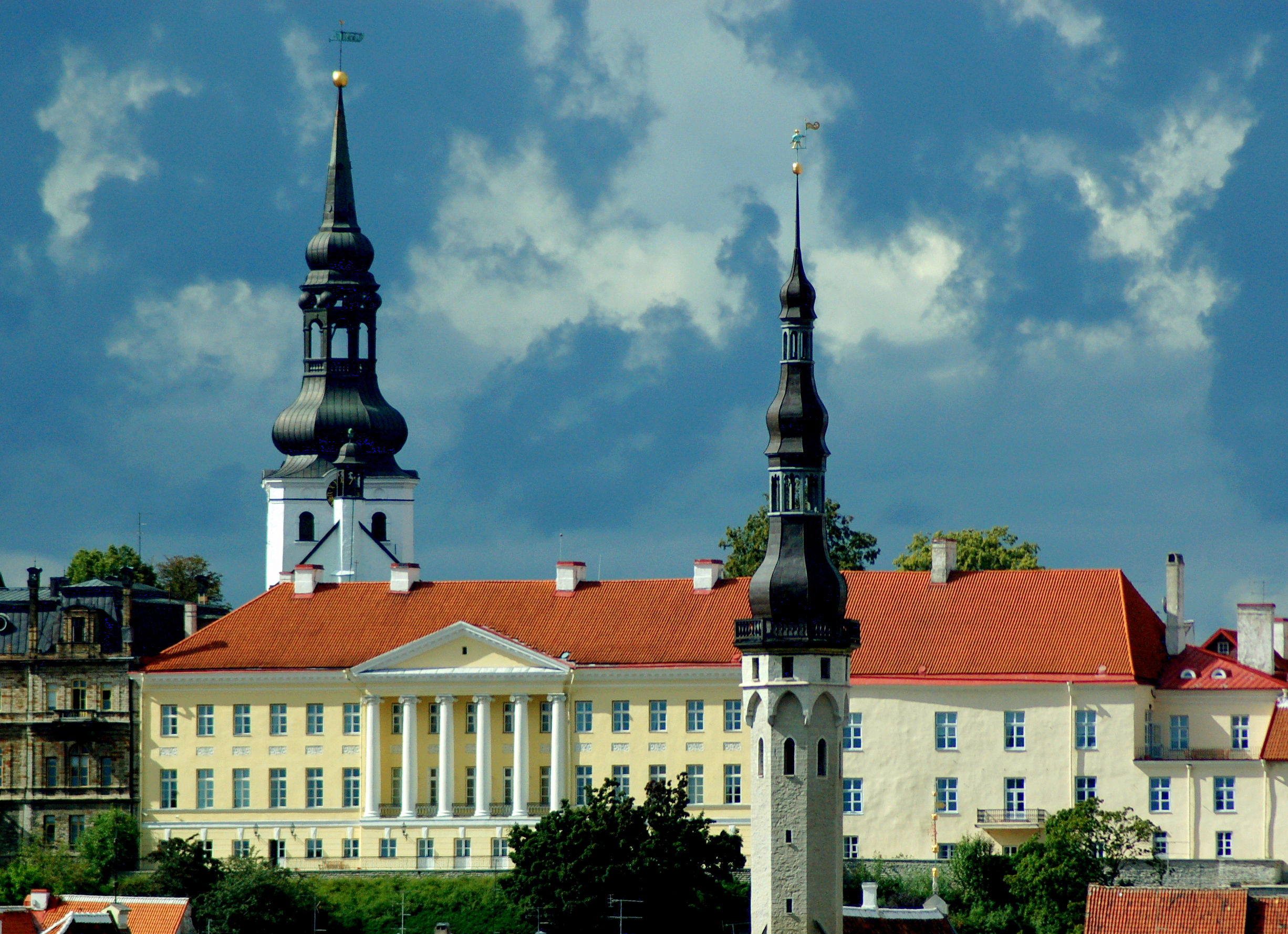 Cloudscape,_tallinn_2006